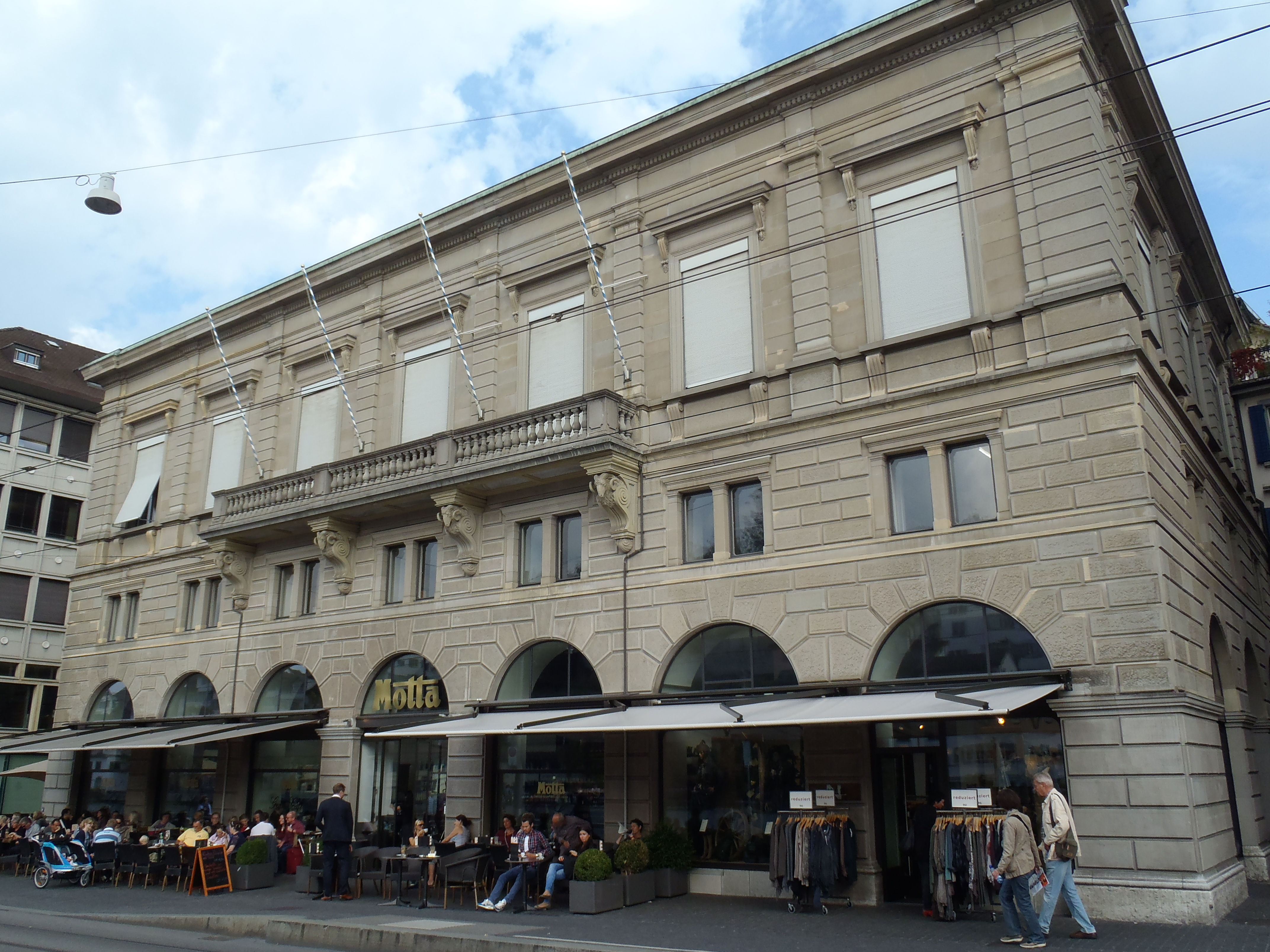 Gesellschaftshaus der Schildner zum Schneggen